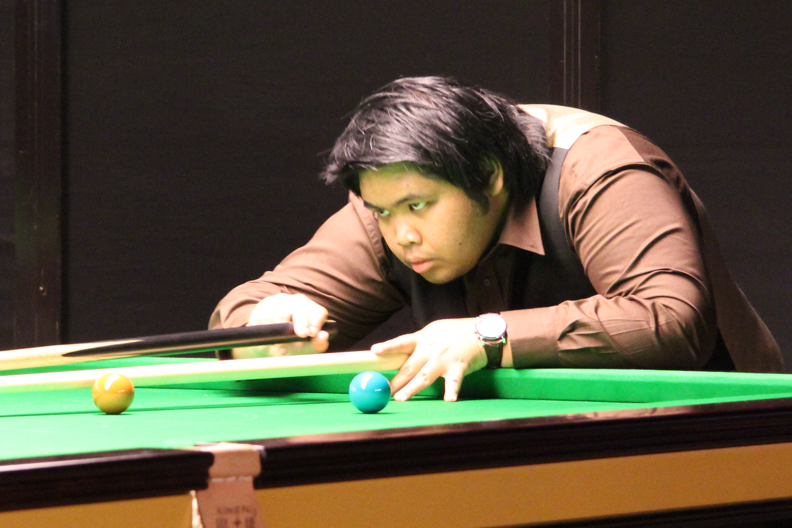 Passakorn Suwannawat beim Paul Hunter Classic 2011